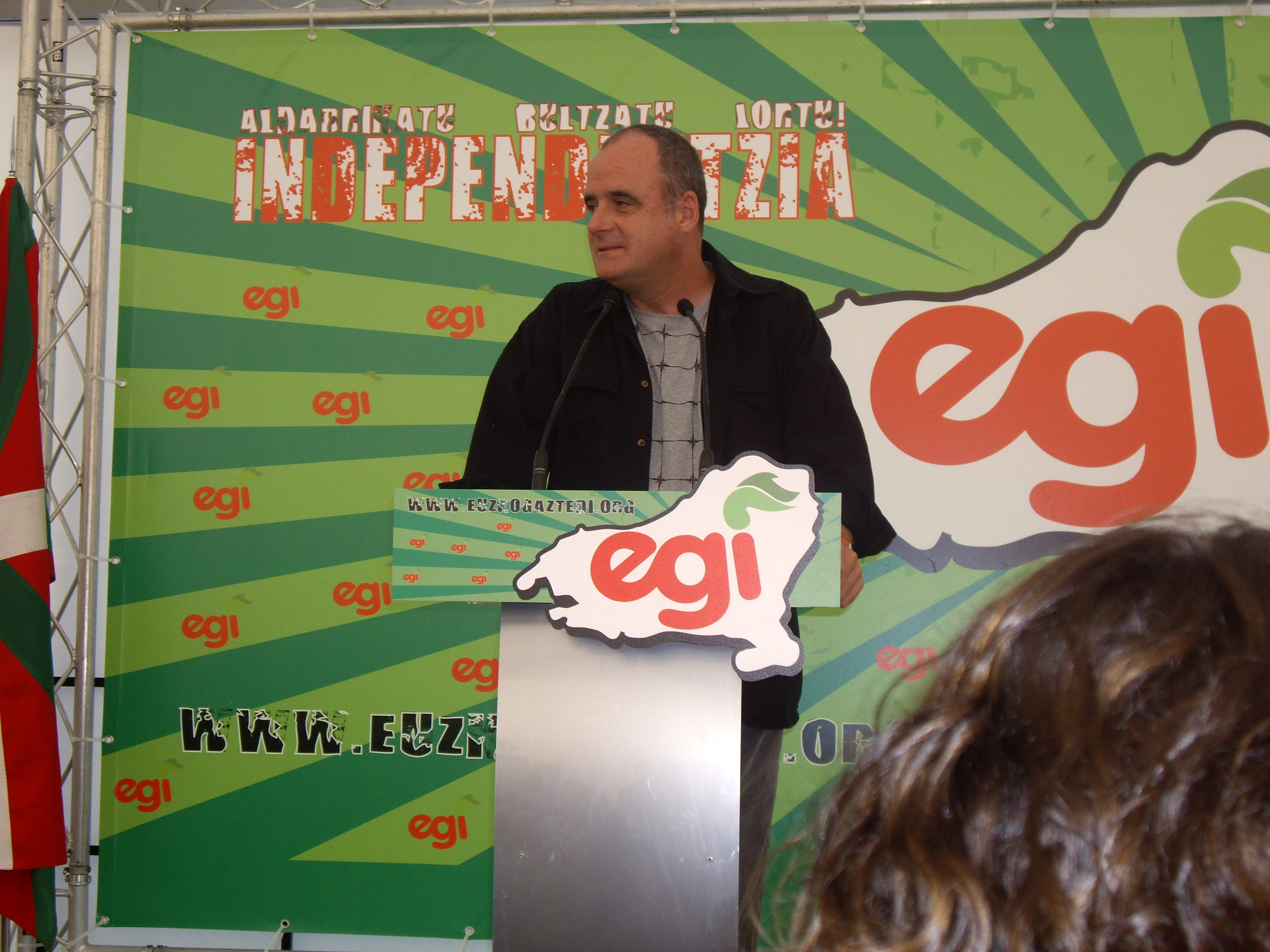 Joseba Egibar Artola.